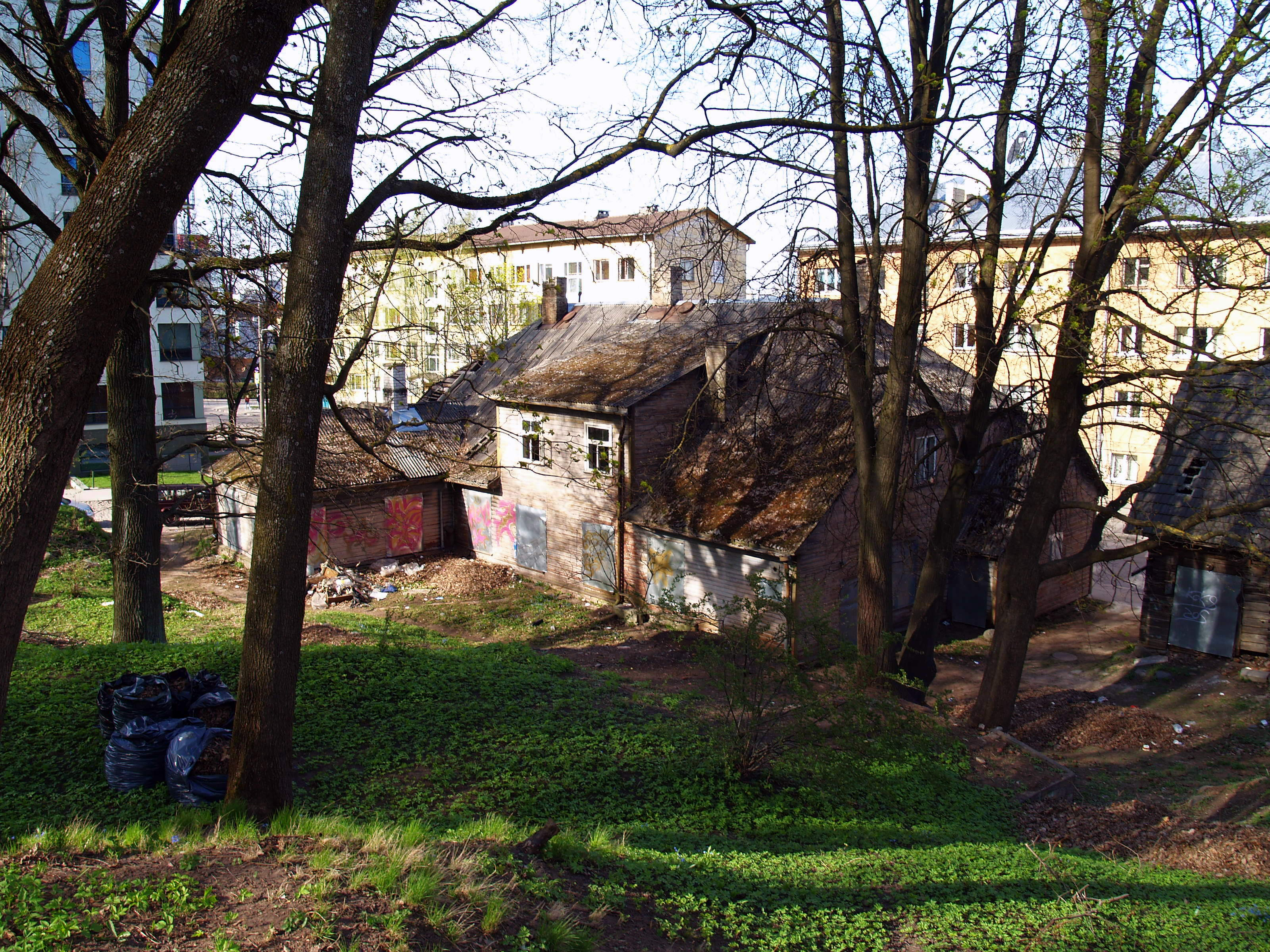 Elamu Tartus Kalevi 11